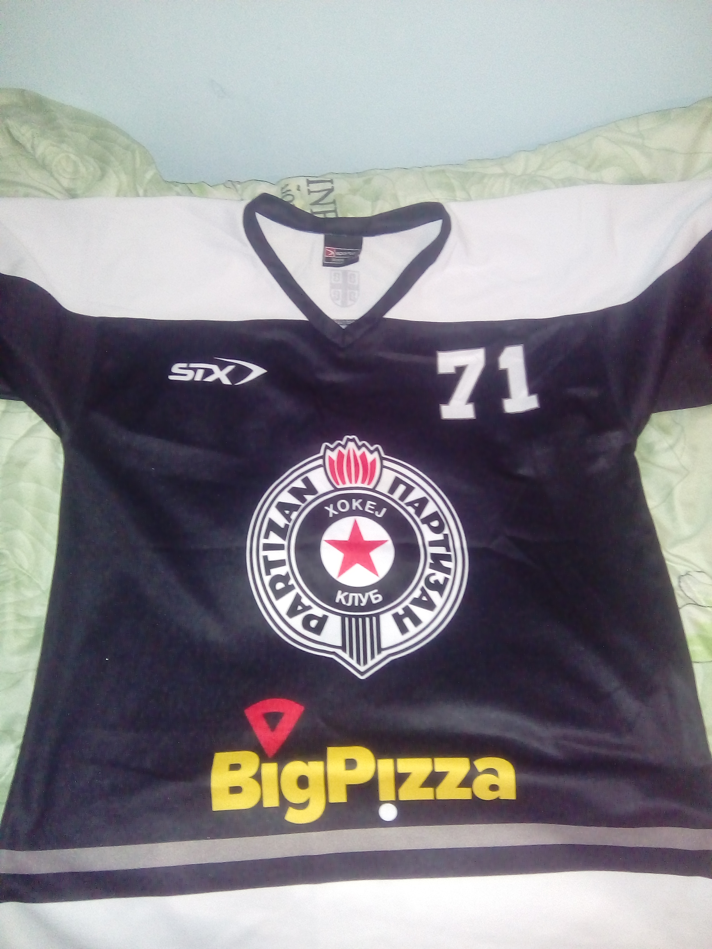 Srpski (latinica): Dres hokejaškog kluba Partizan